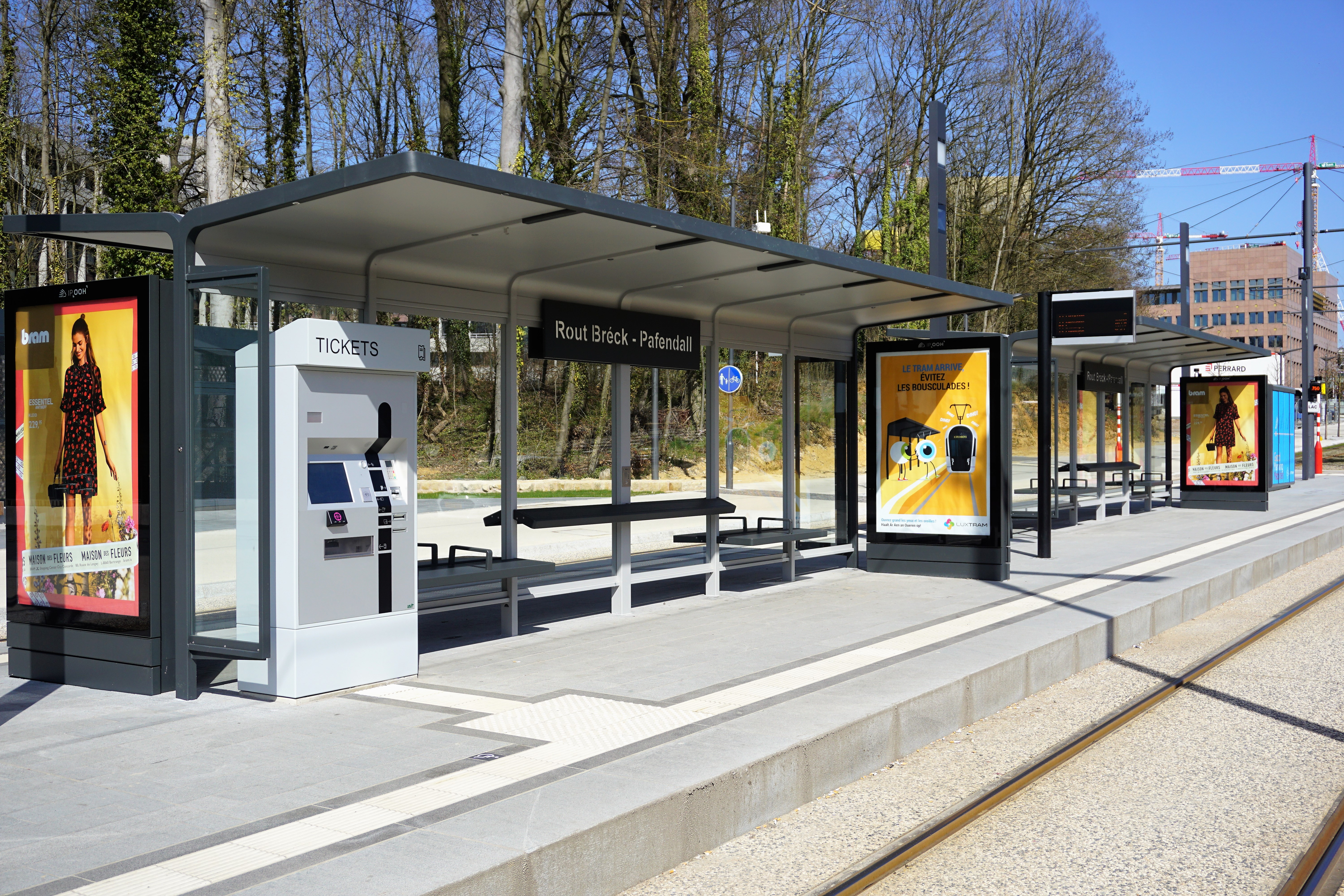 Luxembourg, la station tram Rout Bréck-Pafendall.